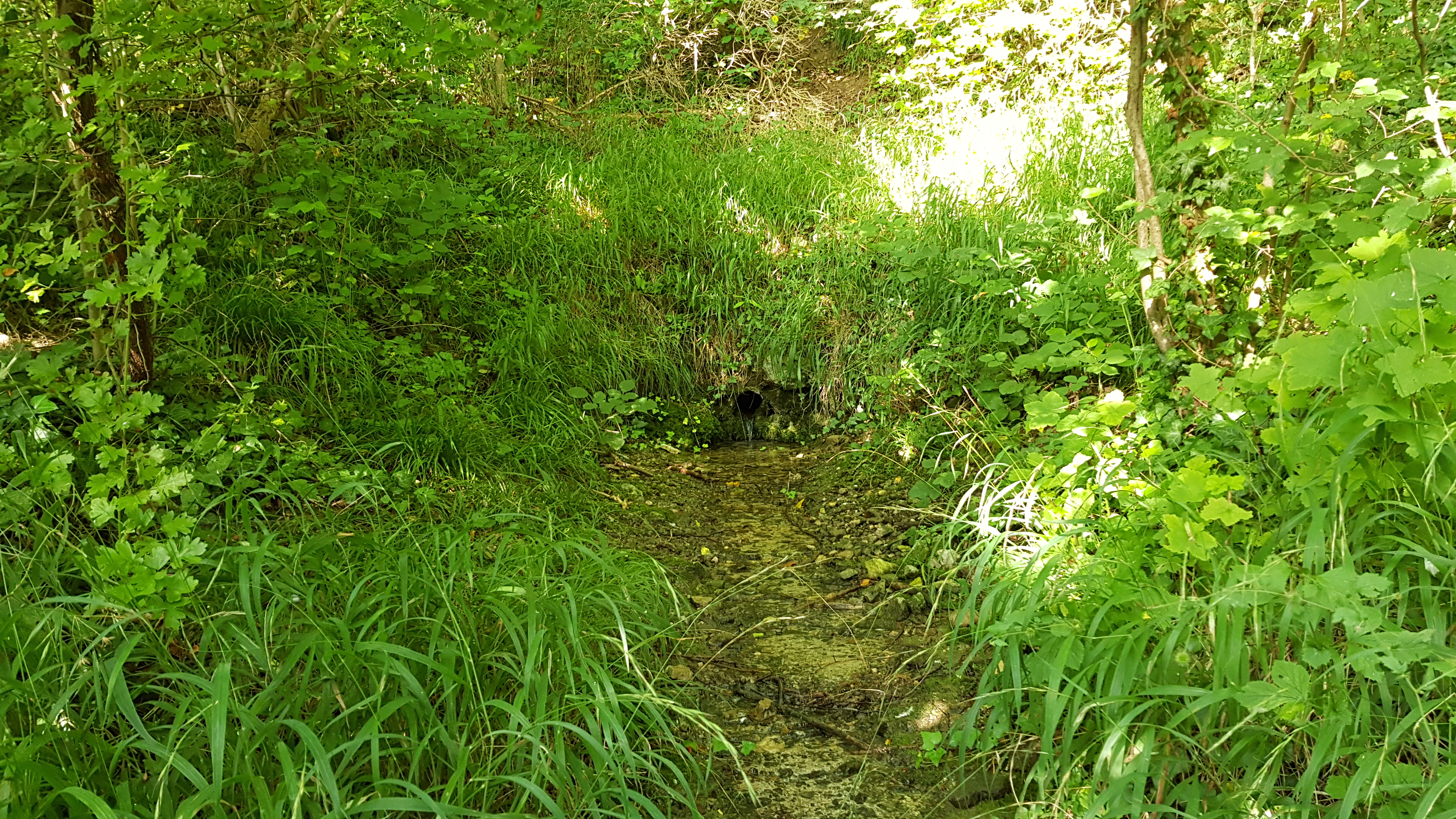 bron van de Putberg, bij Ubachsberg, Nederland